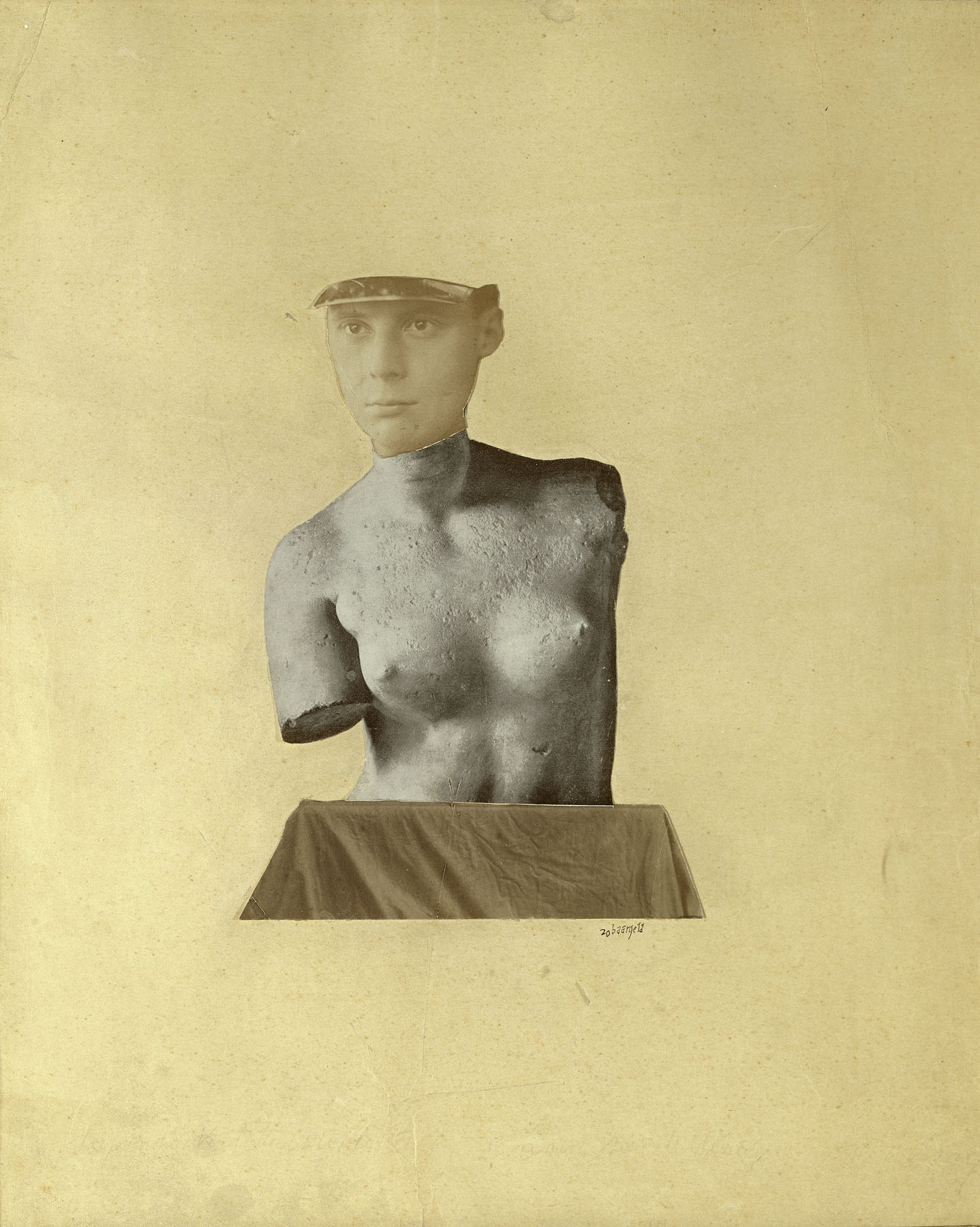 Johannes Theodor Baargeld (Alfred Emanuel Ferdinand Greunwald; 1892–1927): Typical Vertical Mess as Depiction of the Dada Baargeld (Typische Vertikalklitterung als Darstellung des Dada Baargeld), 1920, Kunsthaus Zürich, Graphische Sammlung (Ausschnitt/cropped)